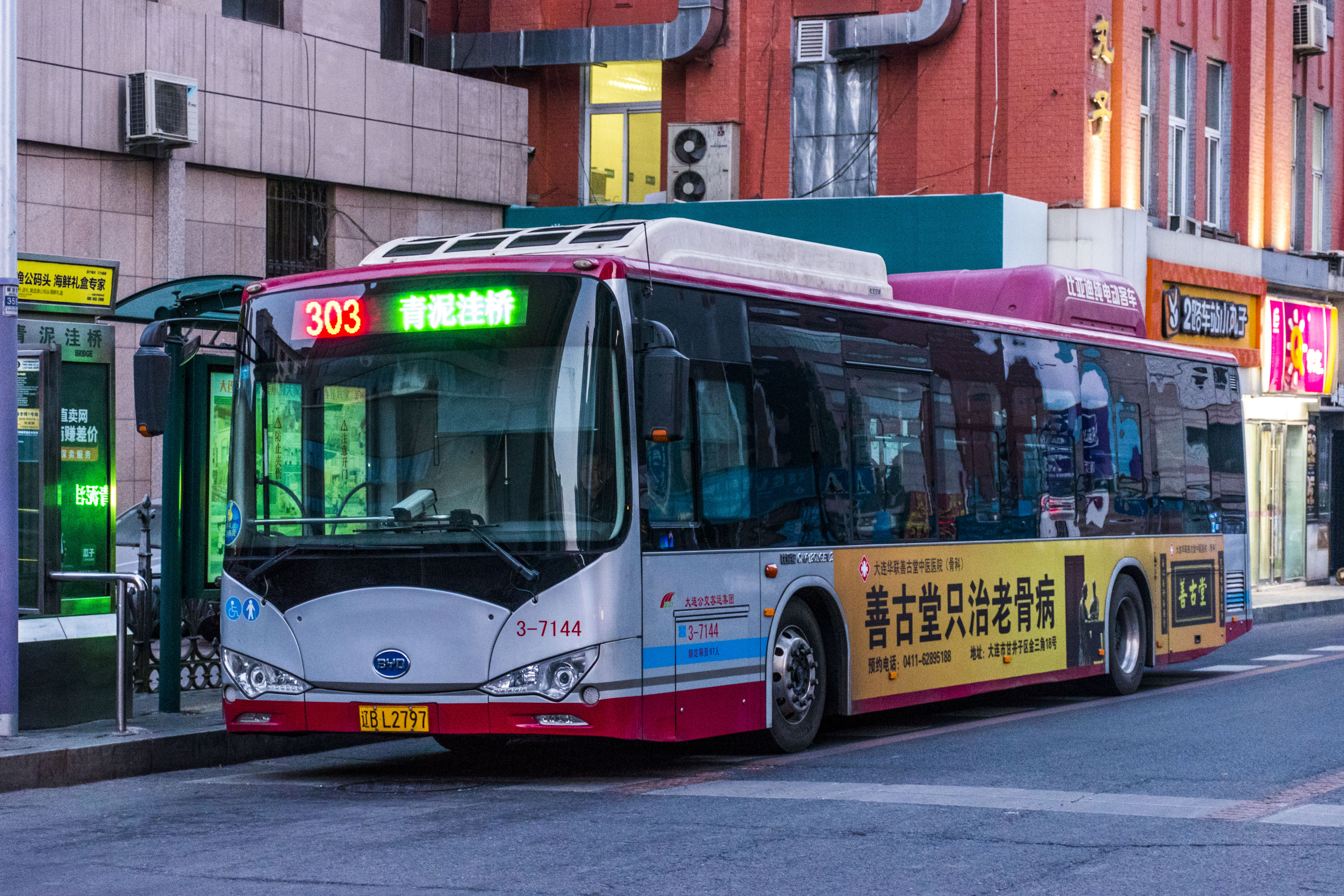 大连公交303路的比亚迪K9A